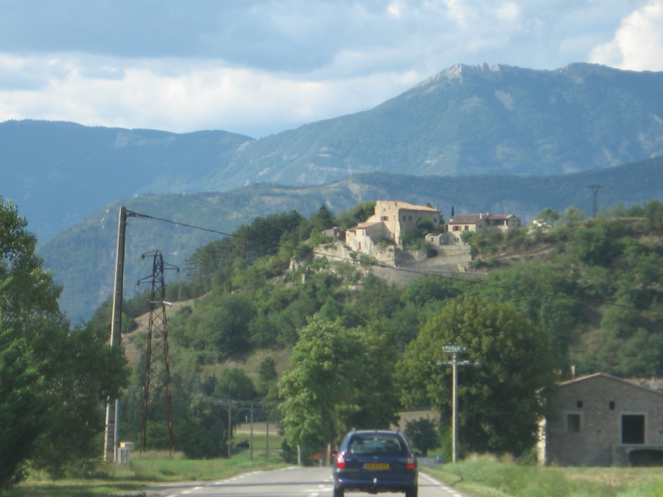 Molières-Glandaz, France